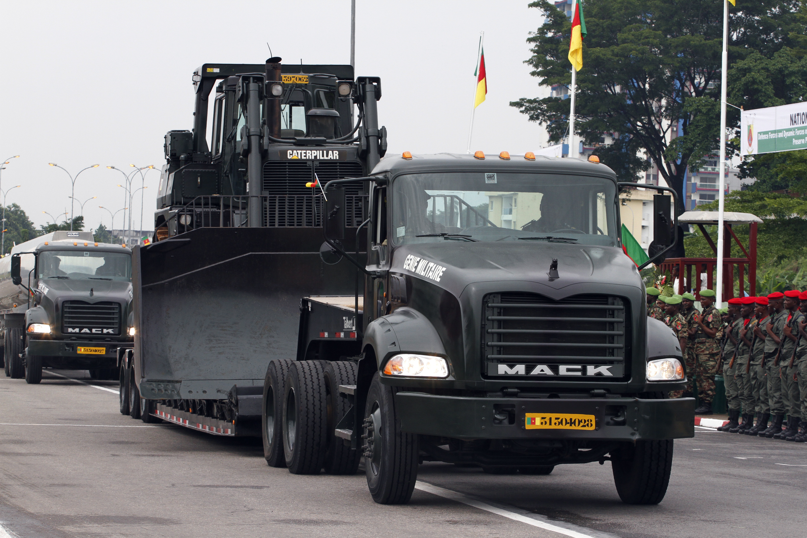 Engins du génie militaire pendant la fête nationale du 20 mai à Douala This is an image with the theme "Africa on the Move or Transport" from: Cameroon